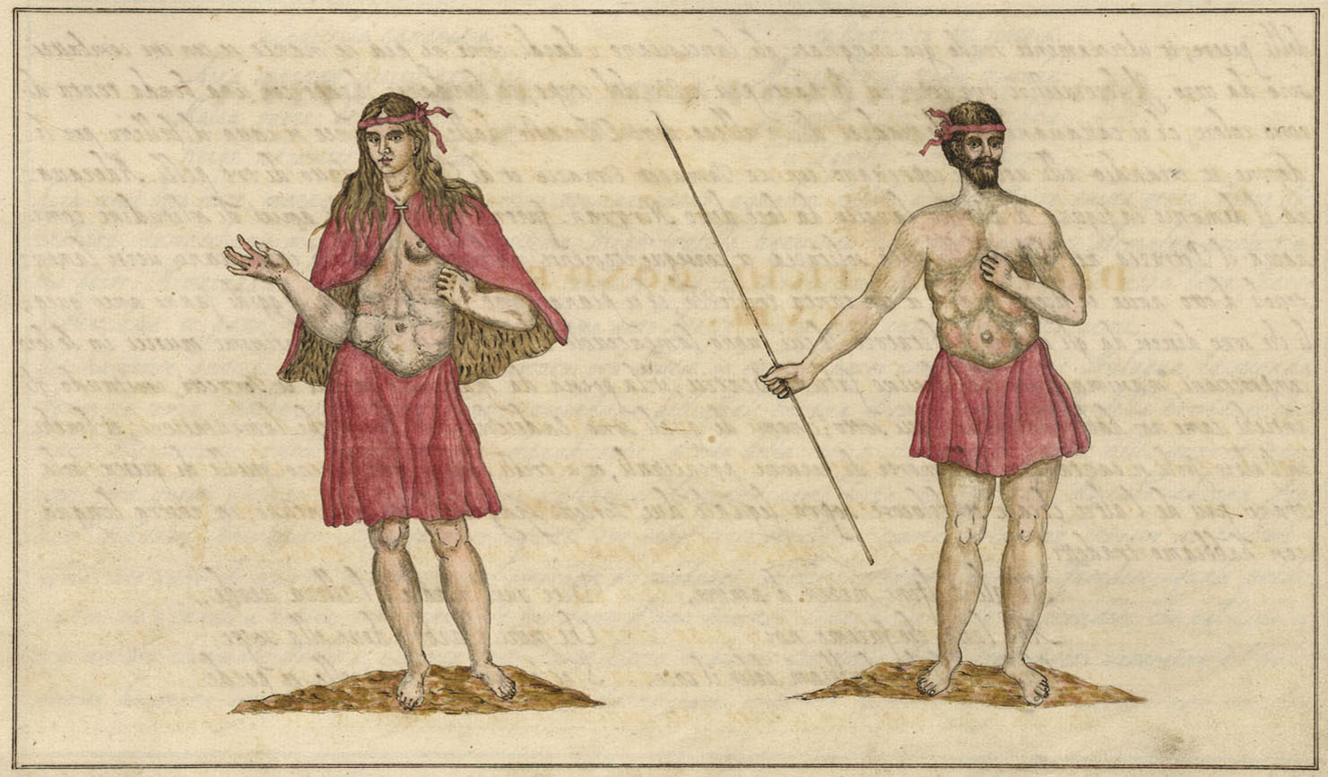 Ureinwohner der Insel La Gomera dargestellt Ende des 16. Jahrhunderts durch Leonardo Torriani